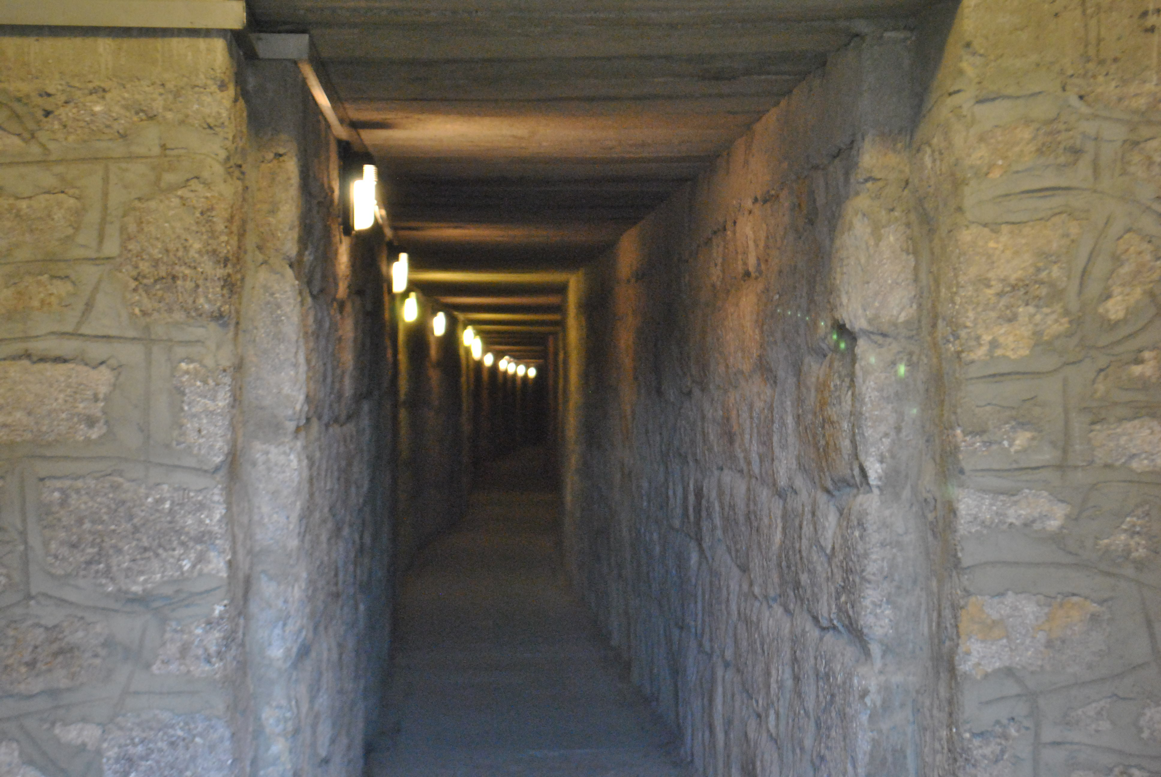 Gordion Müzesi, Ankara, Türkiye